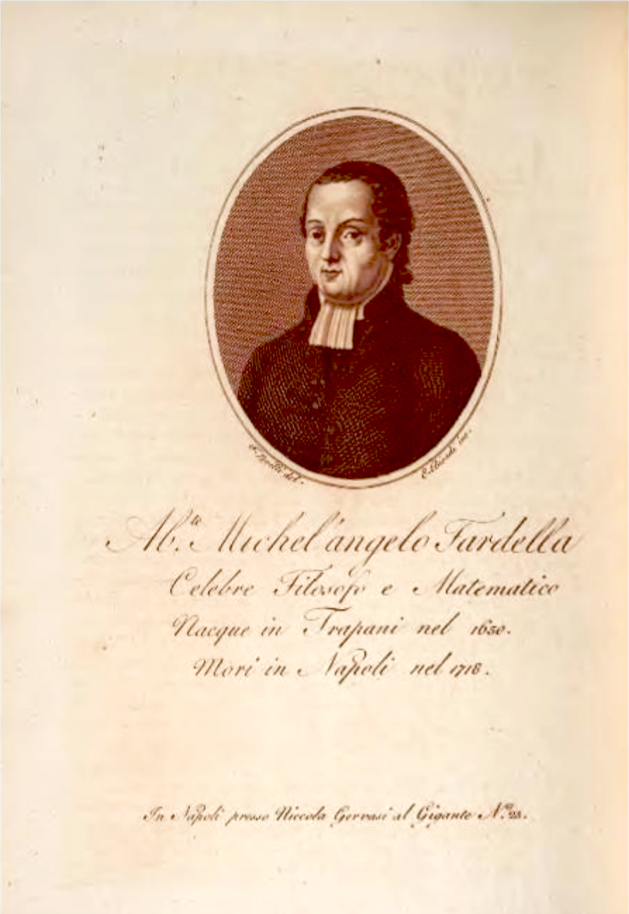 ritratto di Michelangelo Fardella